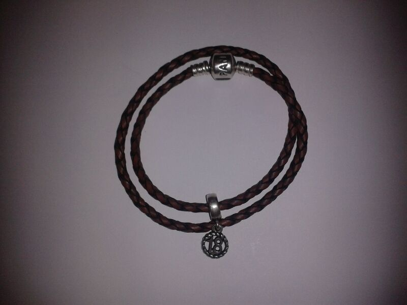 Són braçalets propis per a una entrada en Viquipèdia